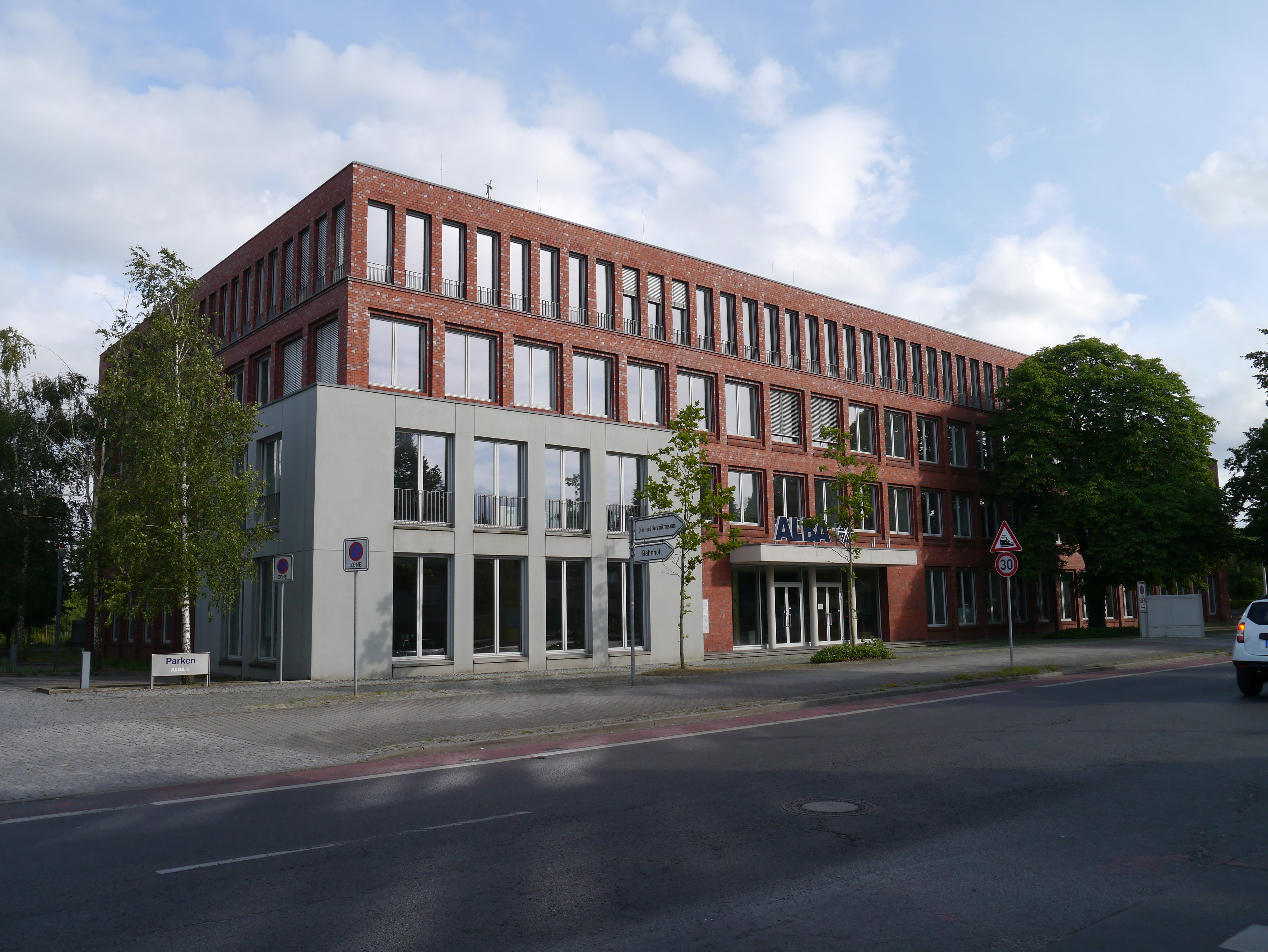 ALBA Management GmbH, Velten, Franz-Josef-Schweitzer-Platz 1, 2014.